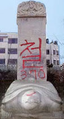 2007年 大清皇帝功德碑 毁損